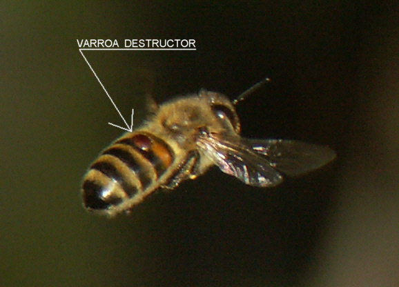 Varroa destructor auf einer Apis mellifera im Flug